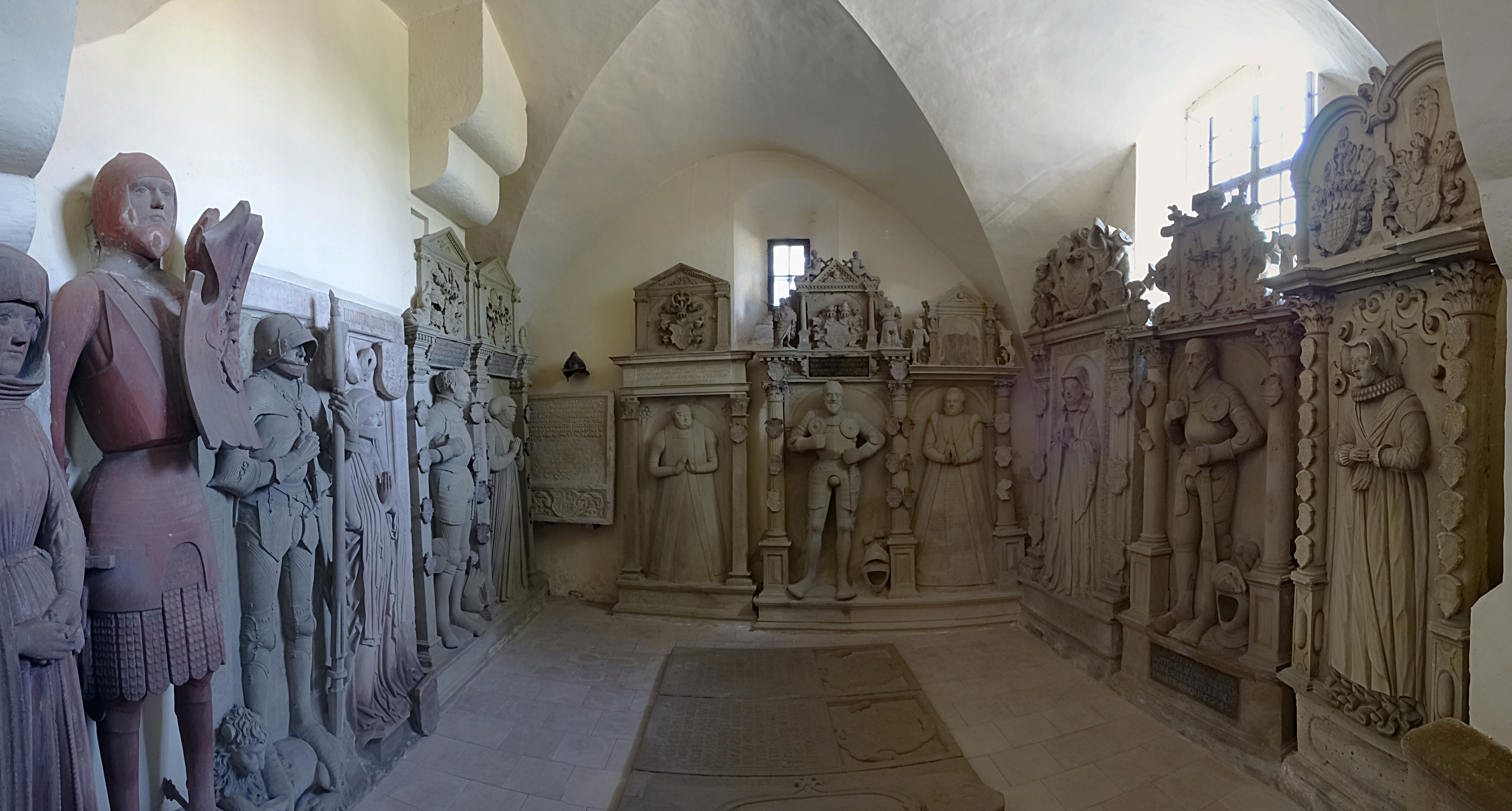 Panorama der St. Ägidien Kapelle in St. Johannis (Schleusingen), Begräbnisort der Schleusinger Linie der Grafen von Henneberg, die 1583 erlosch. Der Innsbrucker Bildhauermeister S. Buchlinger schuf zwischen 1558 und 1583 die Standbilder der Ägidienkapelle.